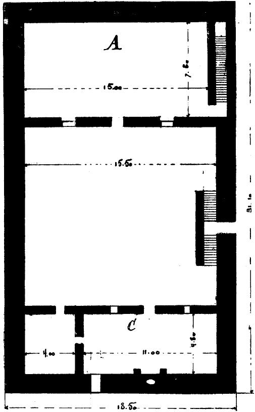 Planche I, page 9 et 10: Plan de la première construction du donjon de Courmenant